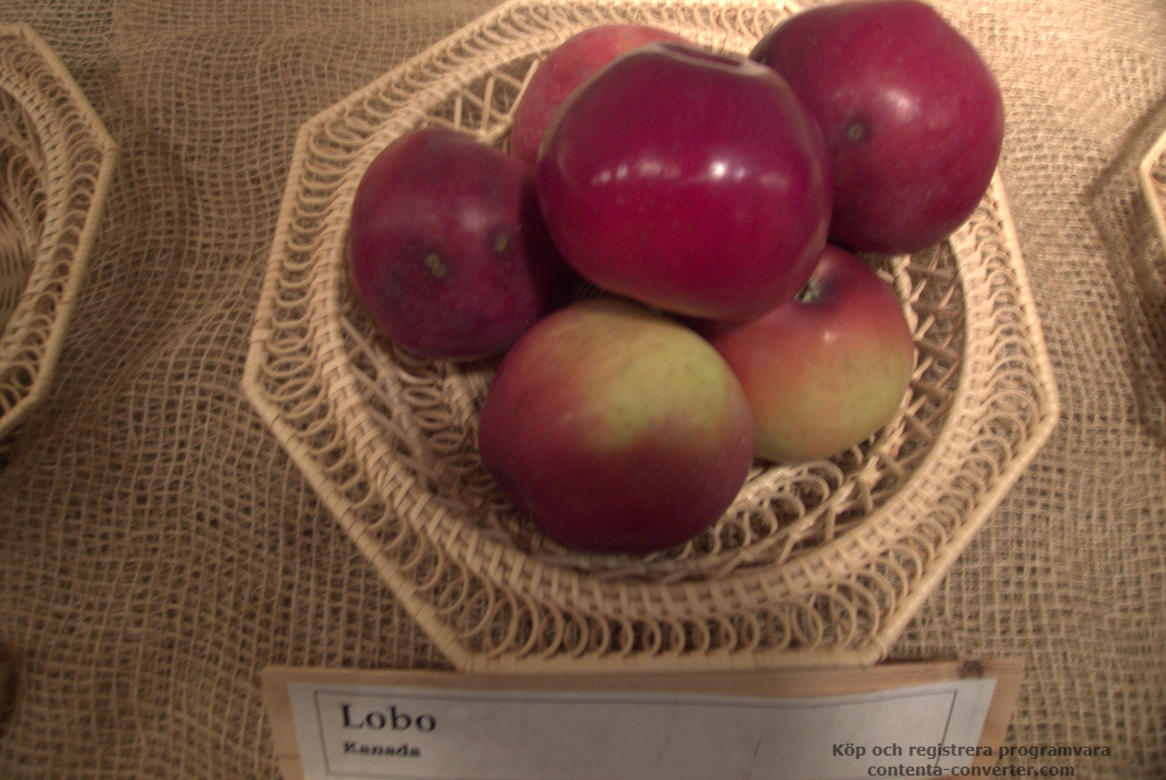 Äpplen av sorten